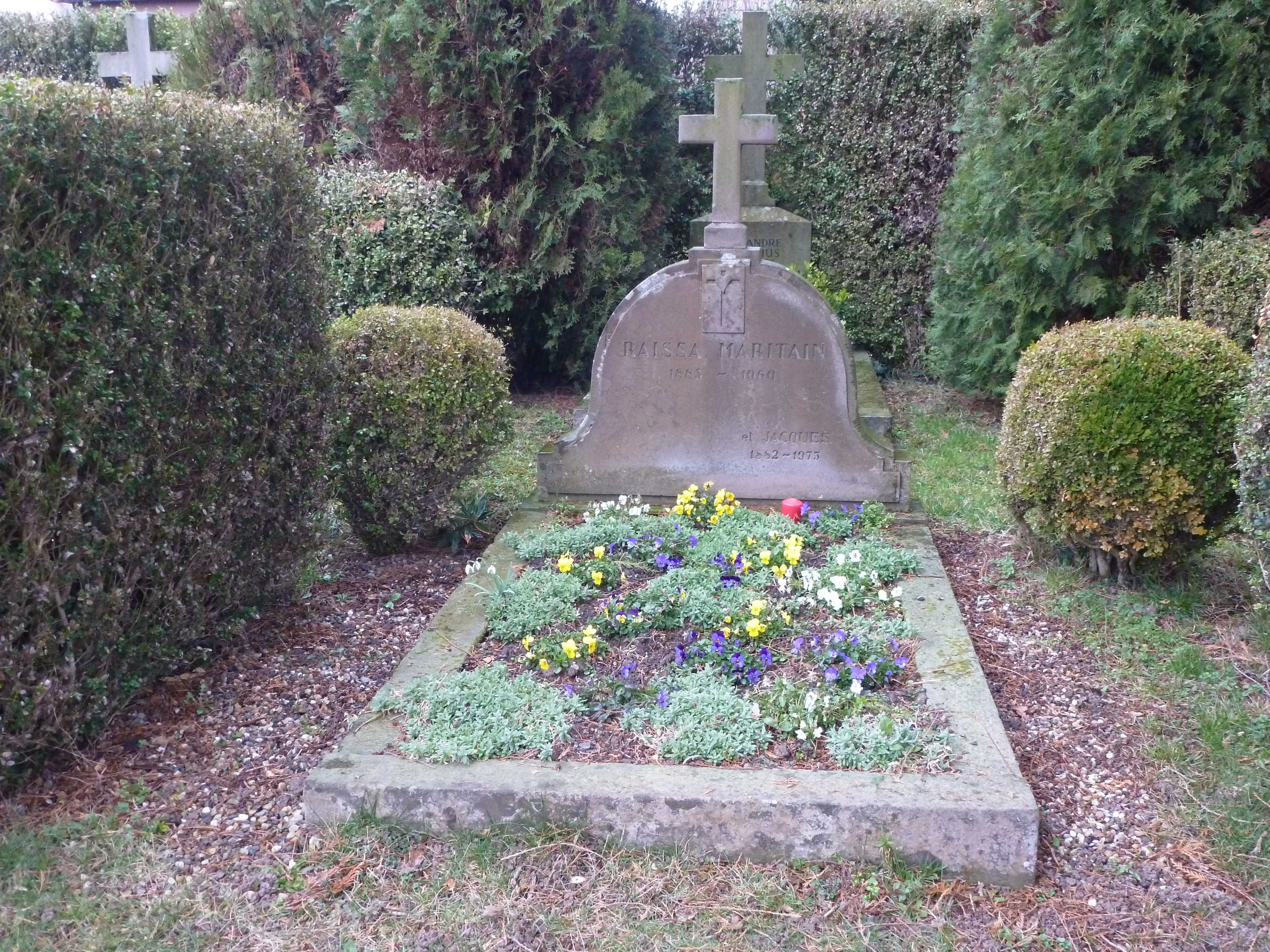 Tombe de Jacques et Raïssa Maritain, au cimetière de Kolbsheim (Bas-Rhin, Alsace, France).